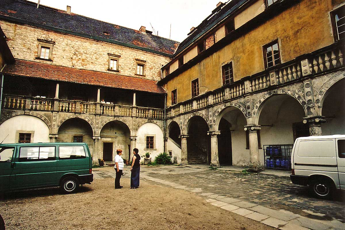 Zamek w Płakowicach - dziedziniec